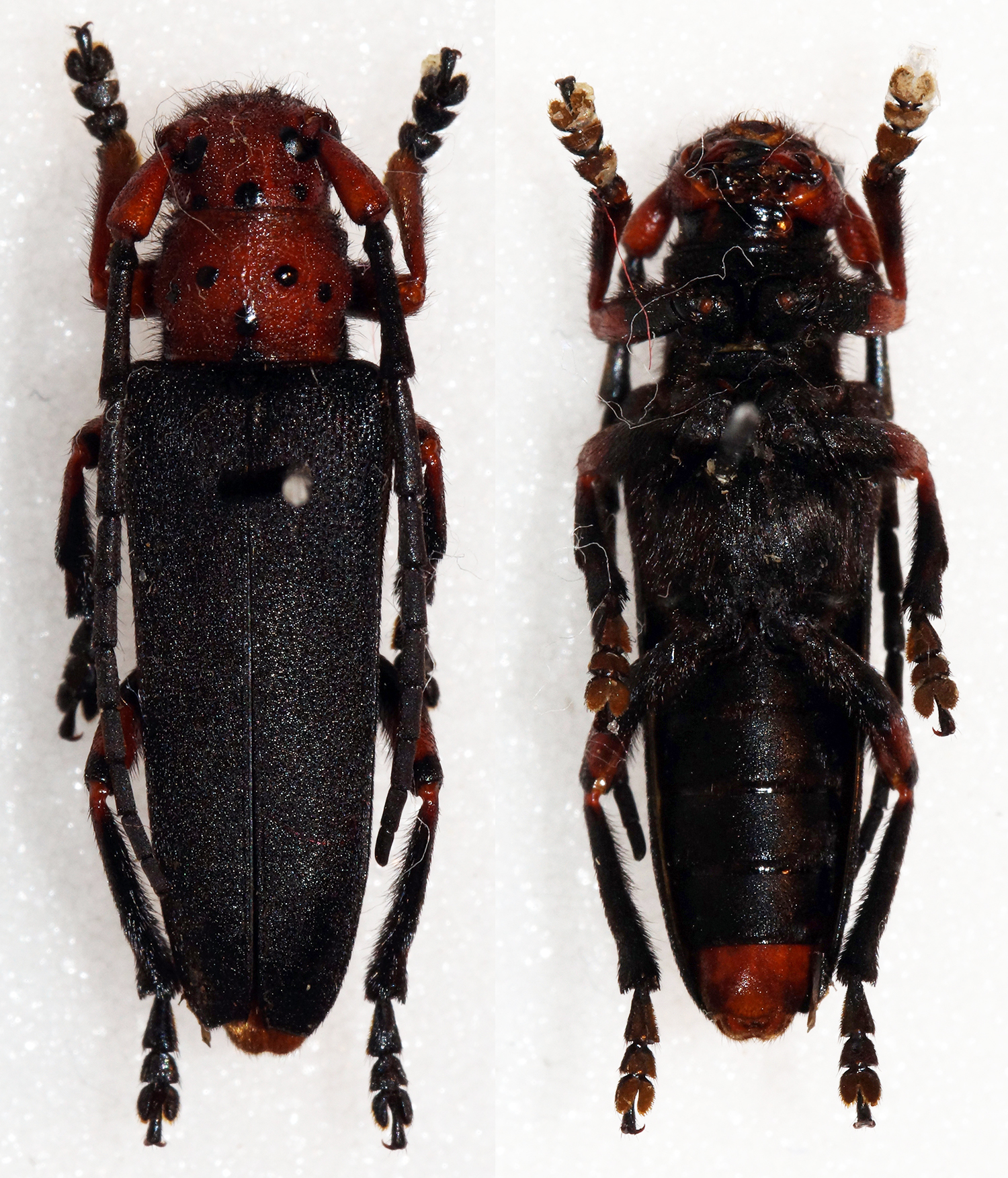 Faldermann,1837 Sex: ? Data: 20-05-92 - Talysh Mts - Gasmalian - Azerbaijan Size: 19.2mm